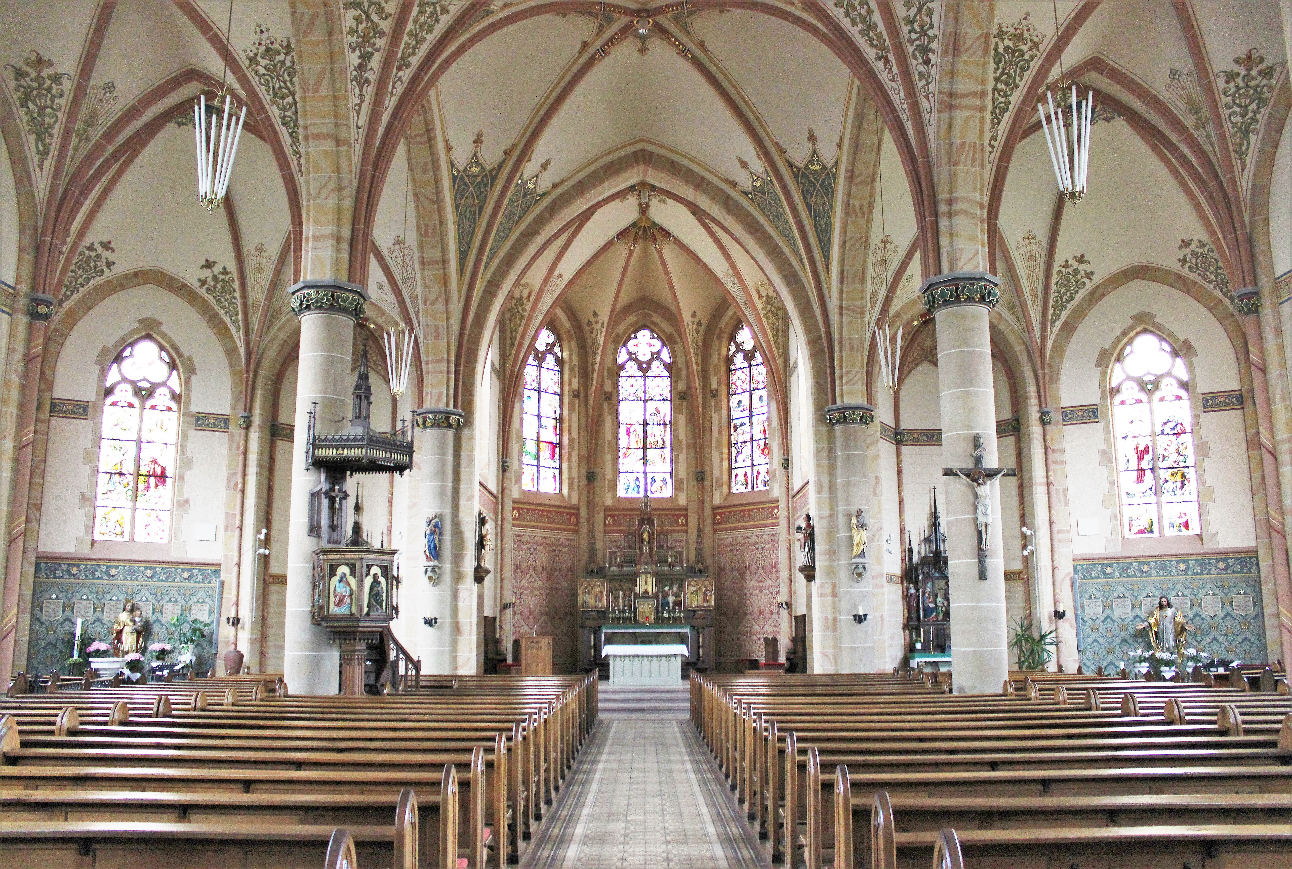 Blick ins Innere der katholischen Pfarrkirche Herz Jesu in Nunkirchen, einem Stadtteil von Wadern, Landkreis Merzig-Wadern, Saarland